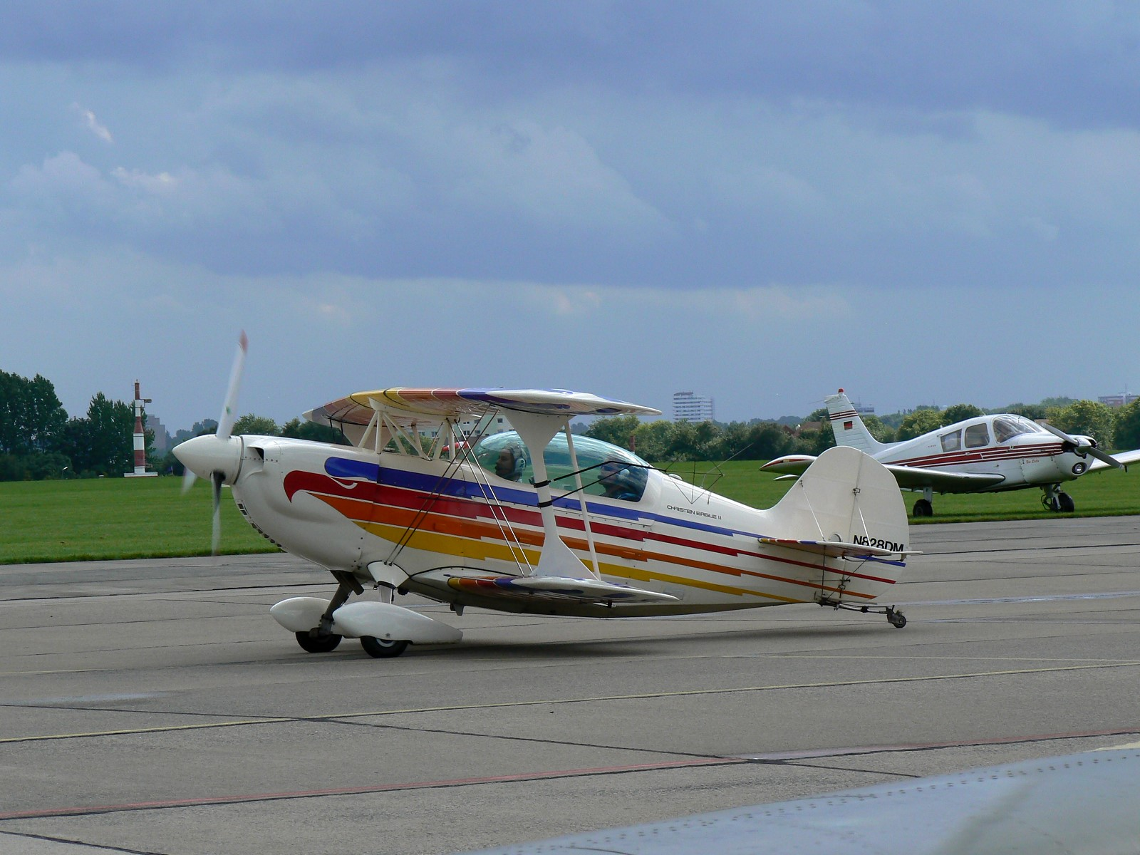 Flugzeug Christen Eagle II.